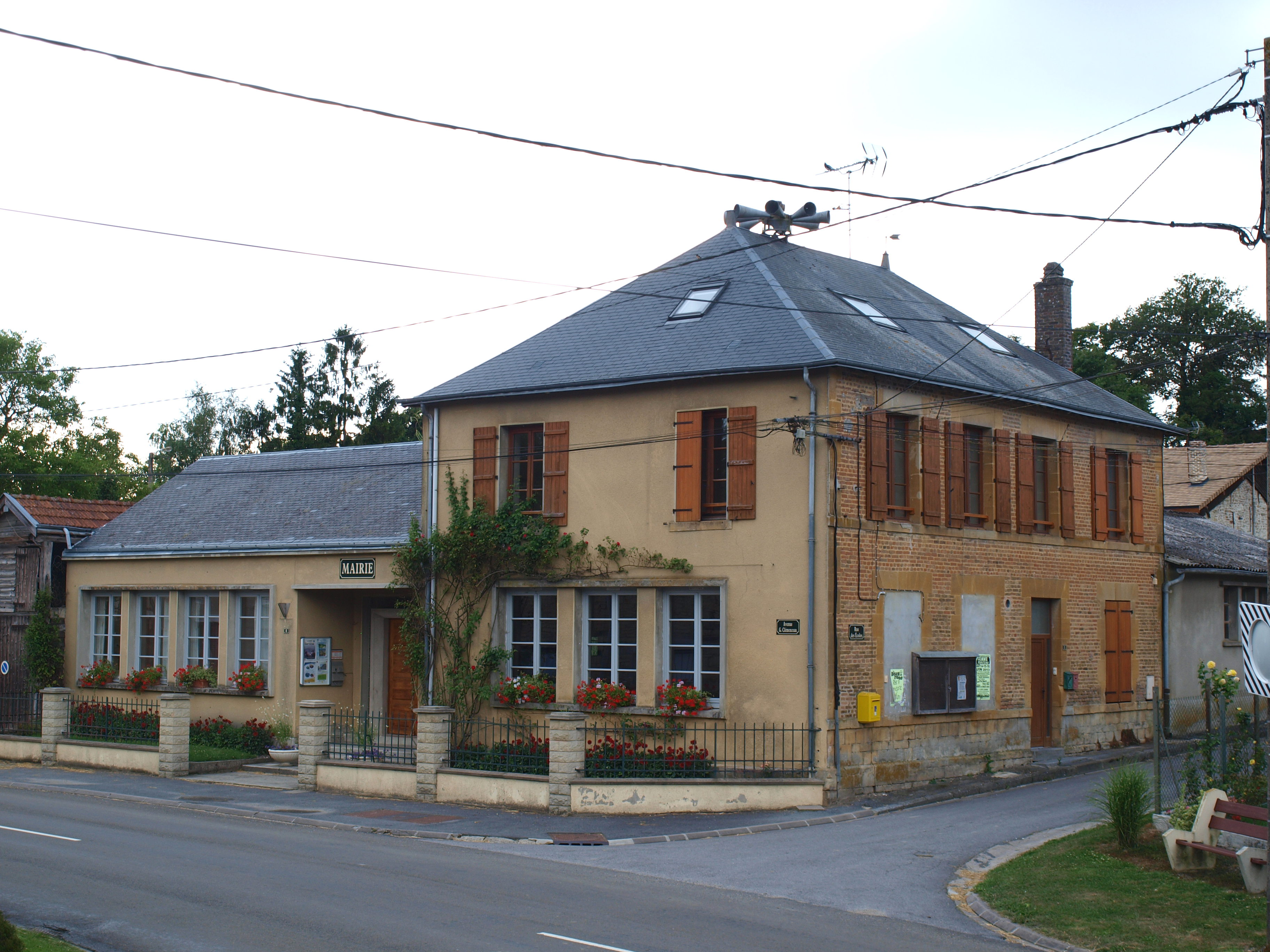 Montcheutin (Ardennes, France) ; mairie.